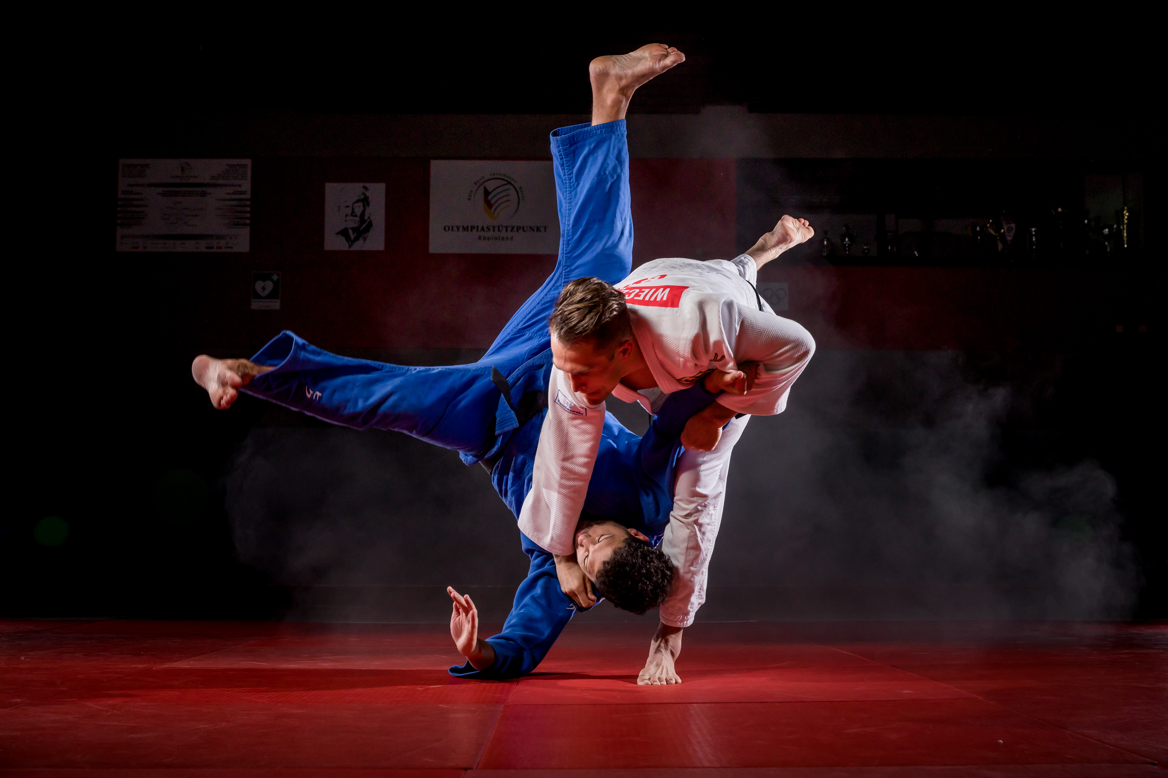 Wieczerzak + Helten by HUBLOT